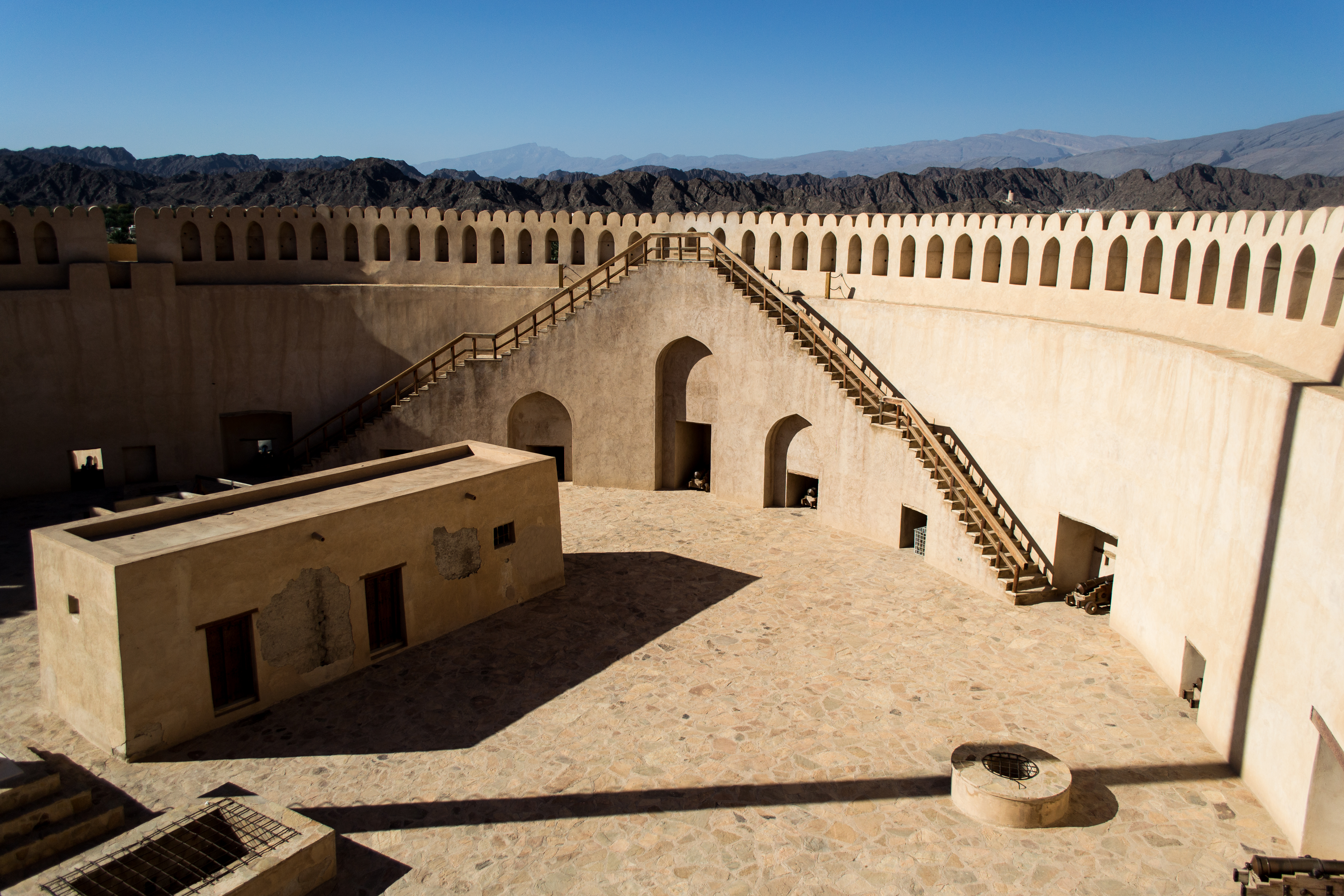 Oman_Day1-031